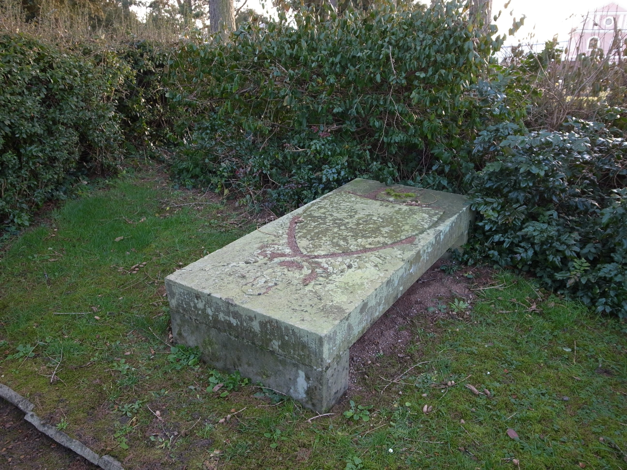 Friedrich von Matthisson,Grabstelle auf den Wörlitzer Friedhof